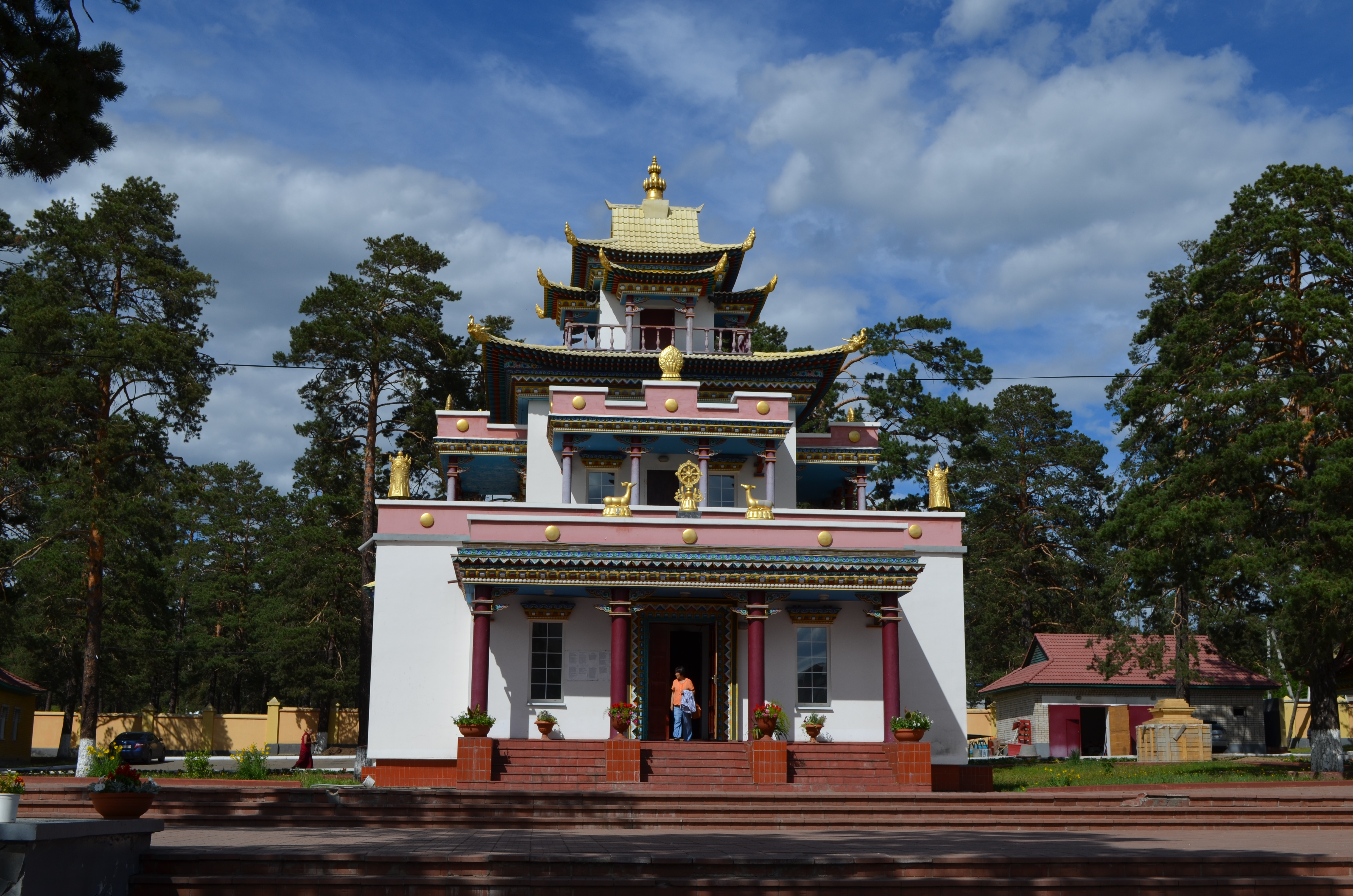 снимки конца июня - начала июля 2015 г.